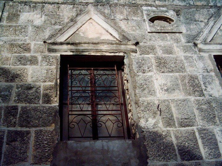 واجهة أحد الأبنية القديمة - بلدة عبا - جنوب لبنان